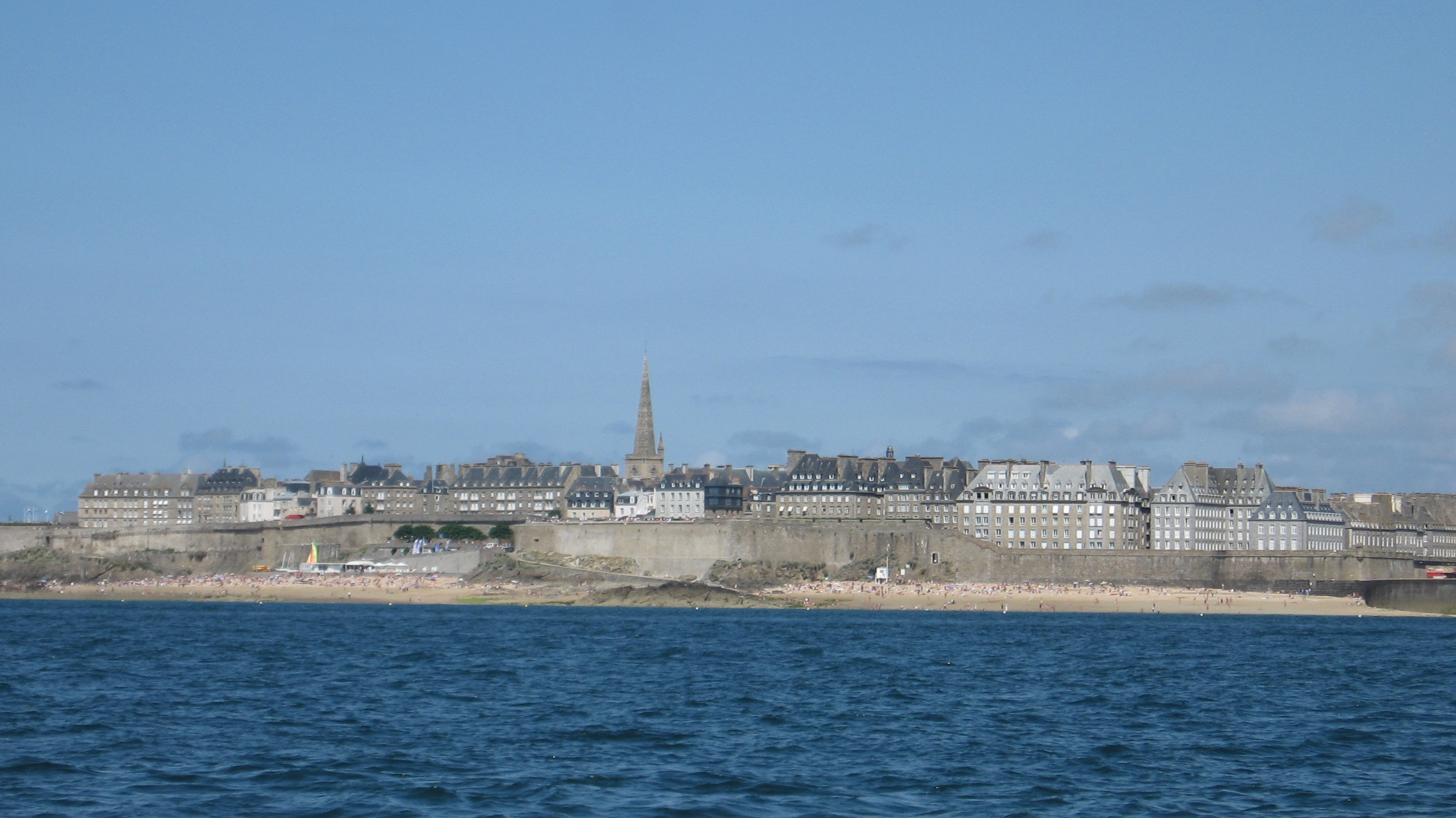 Photo de Saint-Malo(35400) prise du bateau "Perle".